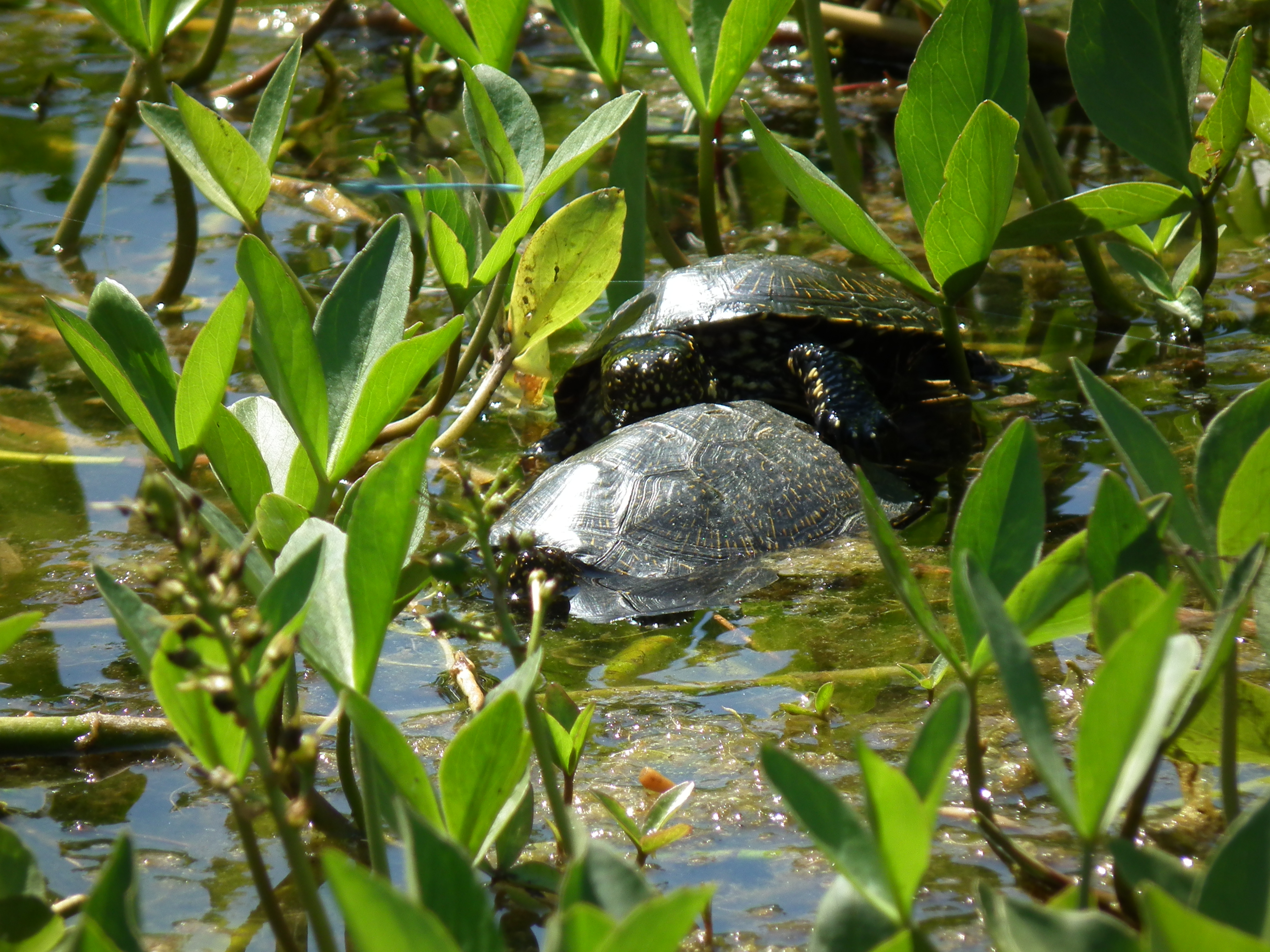 Europäische Sumpfschildkröte (Emys orbicularis), fotografiert in einem Seerosenteich in Weinheim (Baden-Württemberg, Deutschland)